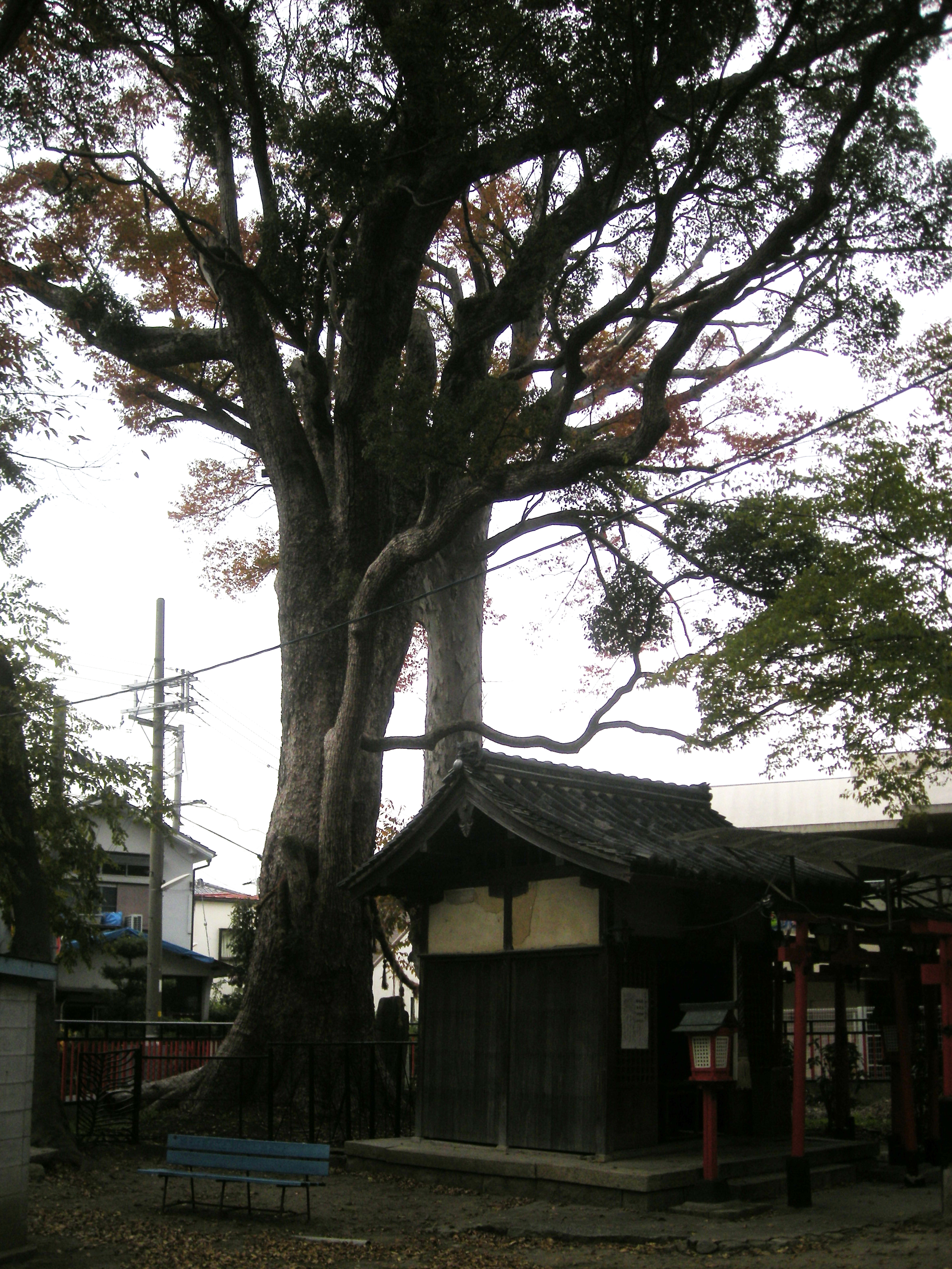 小戸神社 神木